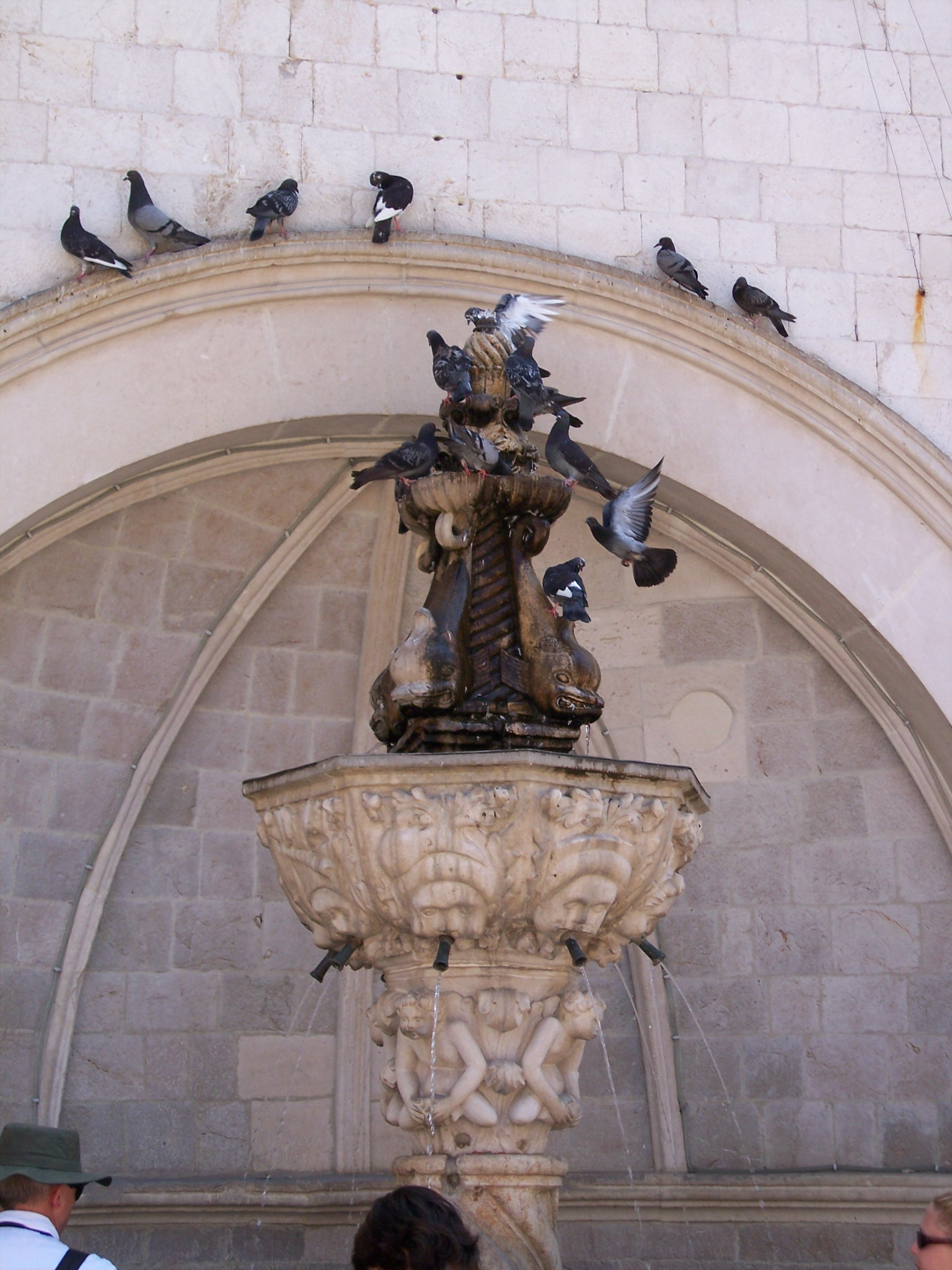 Dubrovnik (Croatia)